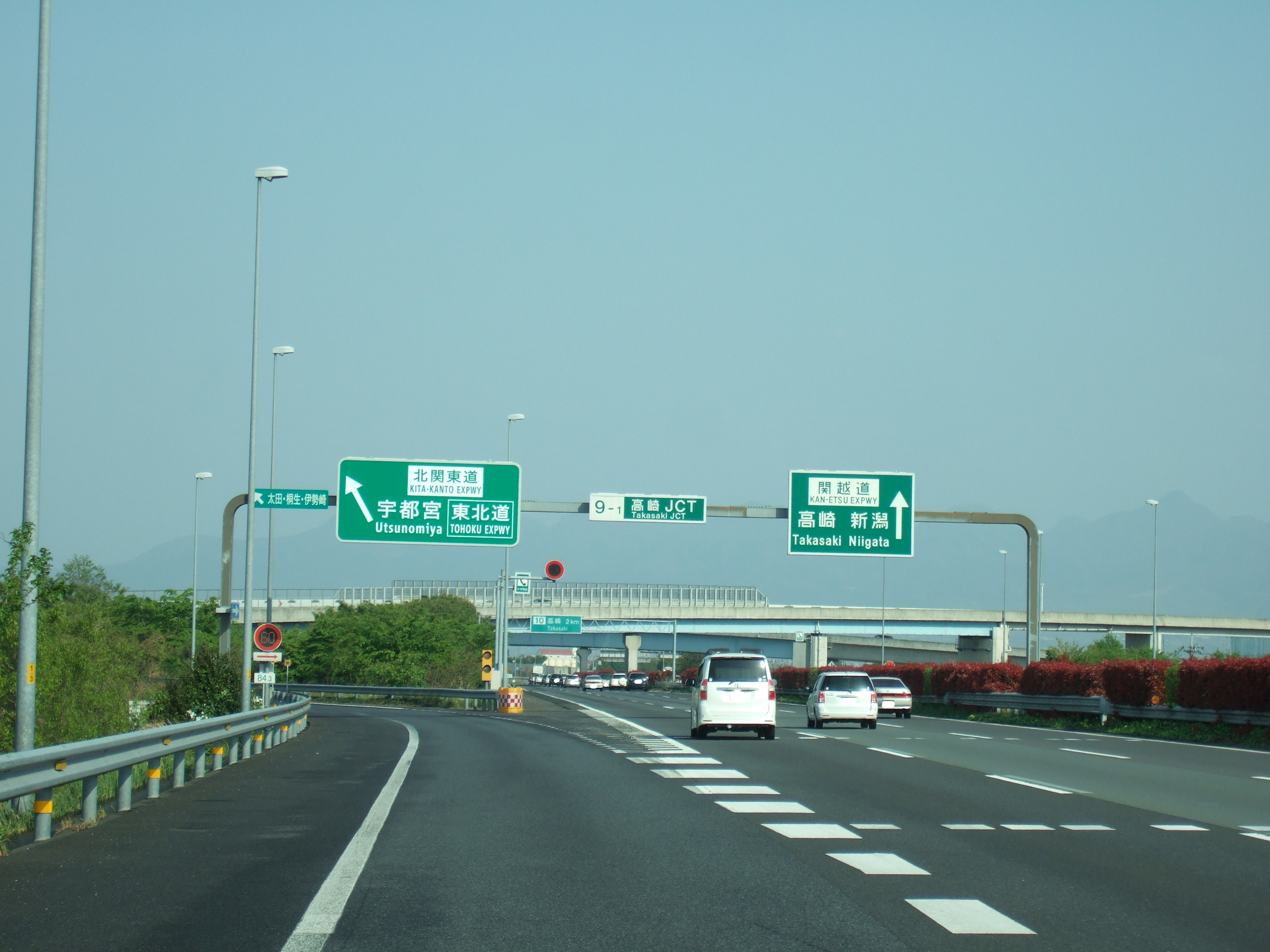 高崎JCT下り分岐